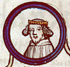 Robert le Fort représenté en médaillon dans un arbre généalogique (détail d'une enluminure du XIVe siècle).